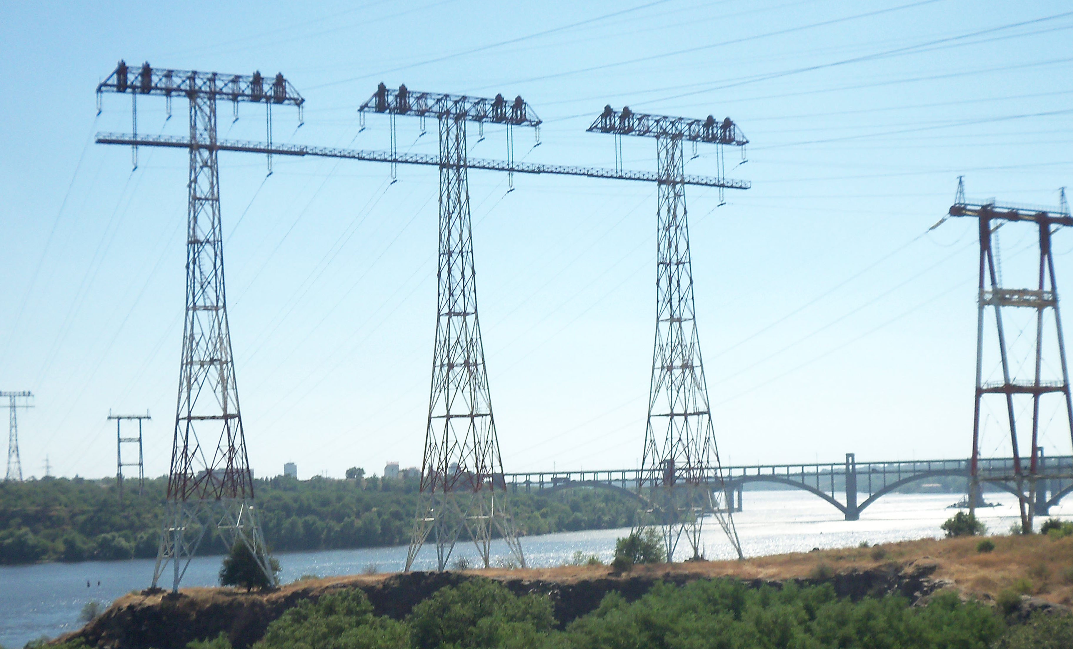 Дніпропроські пороги